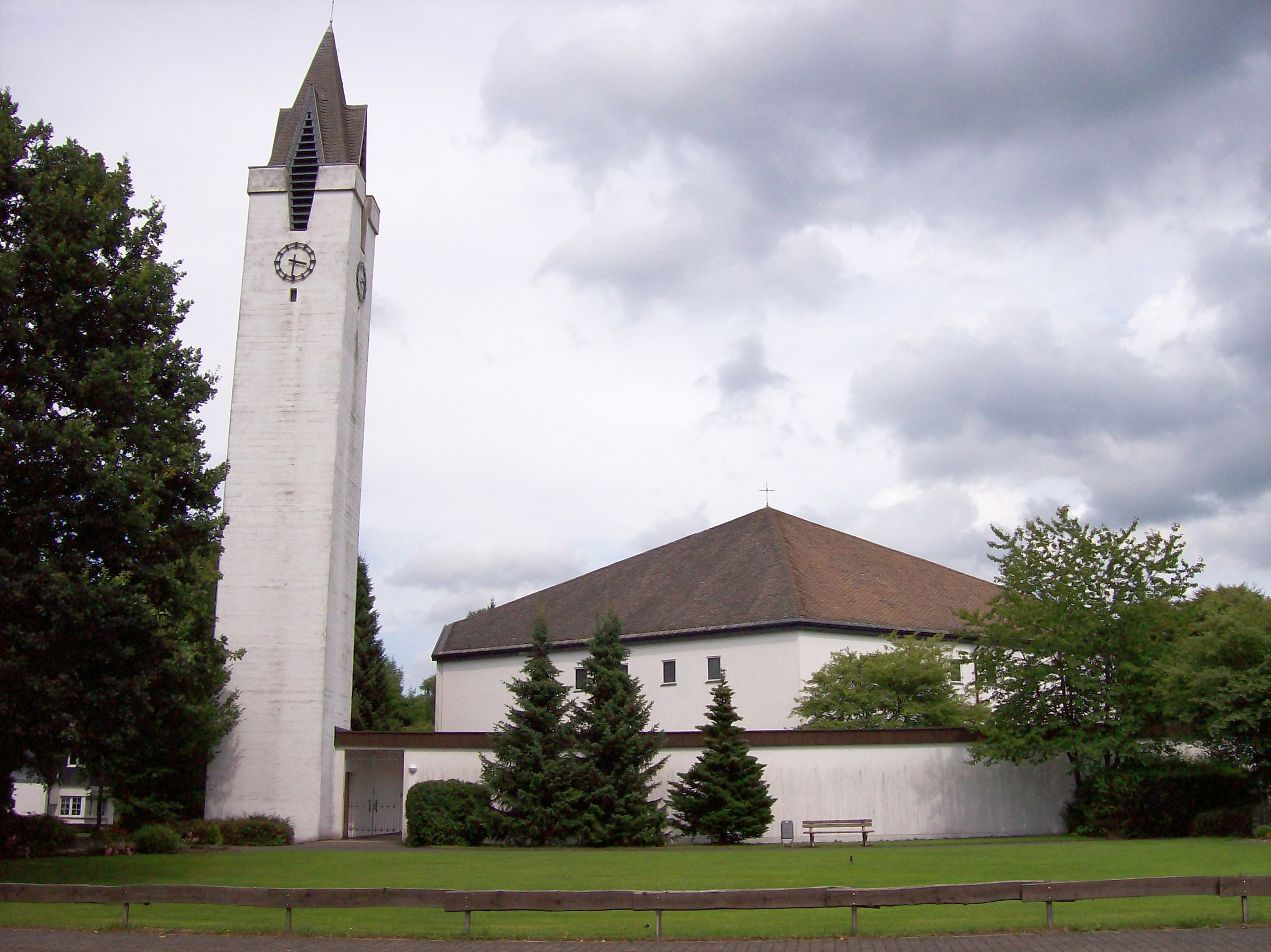 St.- Antonius-Pfarrkirche, Eslohe-Bremke (Germany)